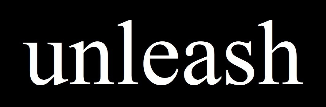 Unleash logo